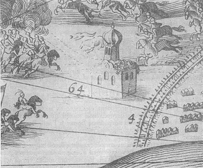 Церковь Василия Борисоглебского монастыря на гравюре В. Гондиуса.